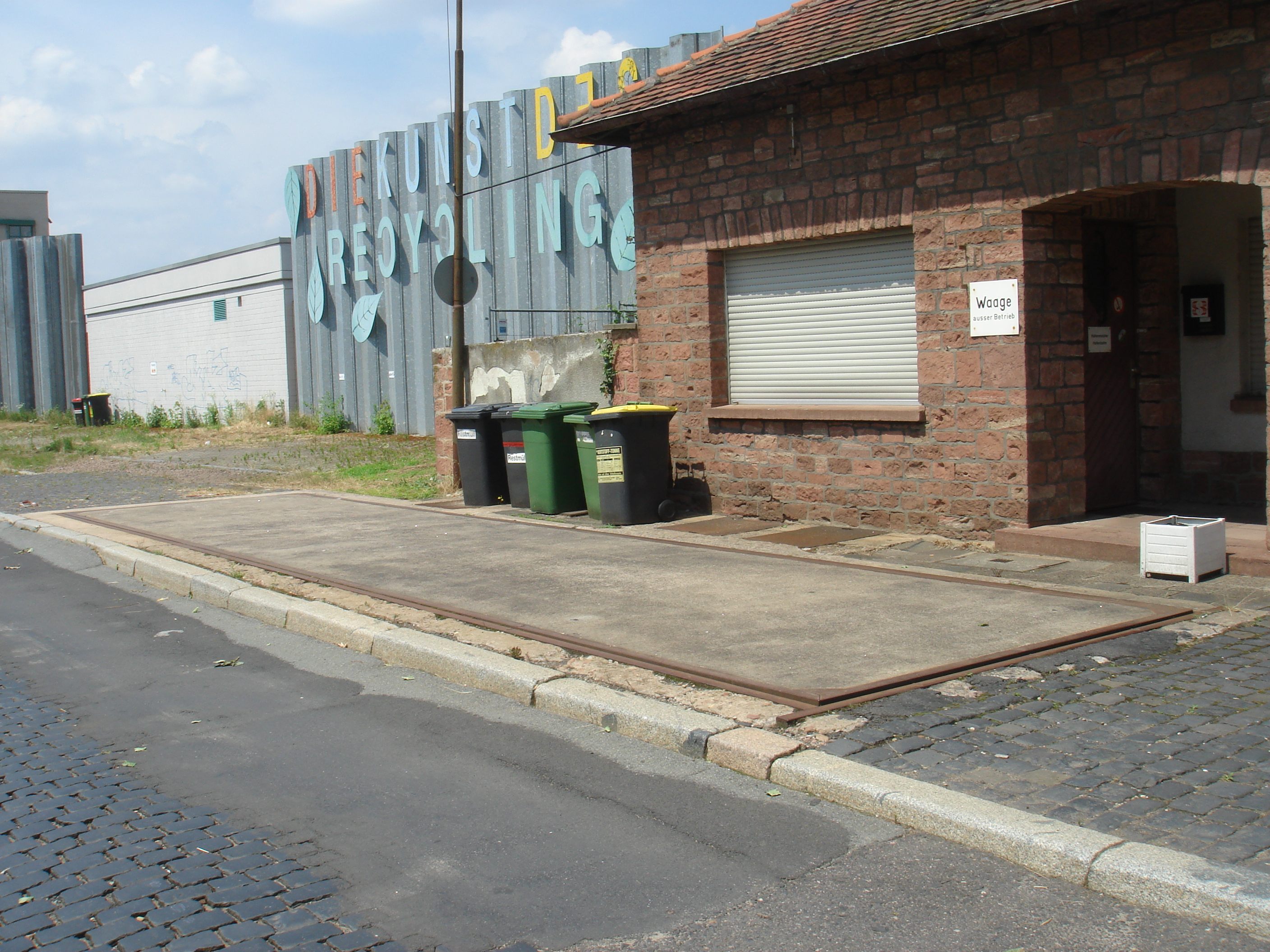 LKW Waage, außer Betrieb. Trolly Scale